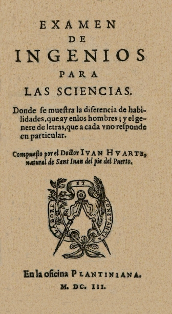 Portada del libro "Examen de ingenios para las sciencias", publicado por Juan Huarte de San Juan en 1603 (la primera edición es de 1575).